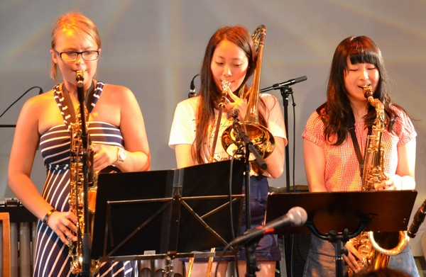 Barn fra Norge og Japan spiller sammen på avslutningskonserten for Kids in Jazz 2014, på Caféteatret i Oslo